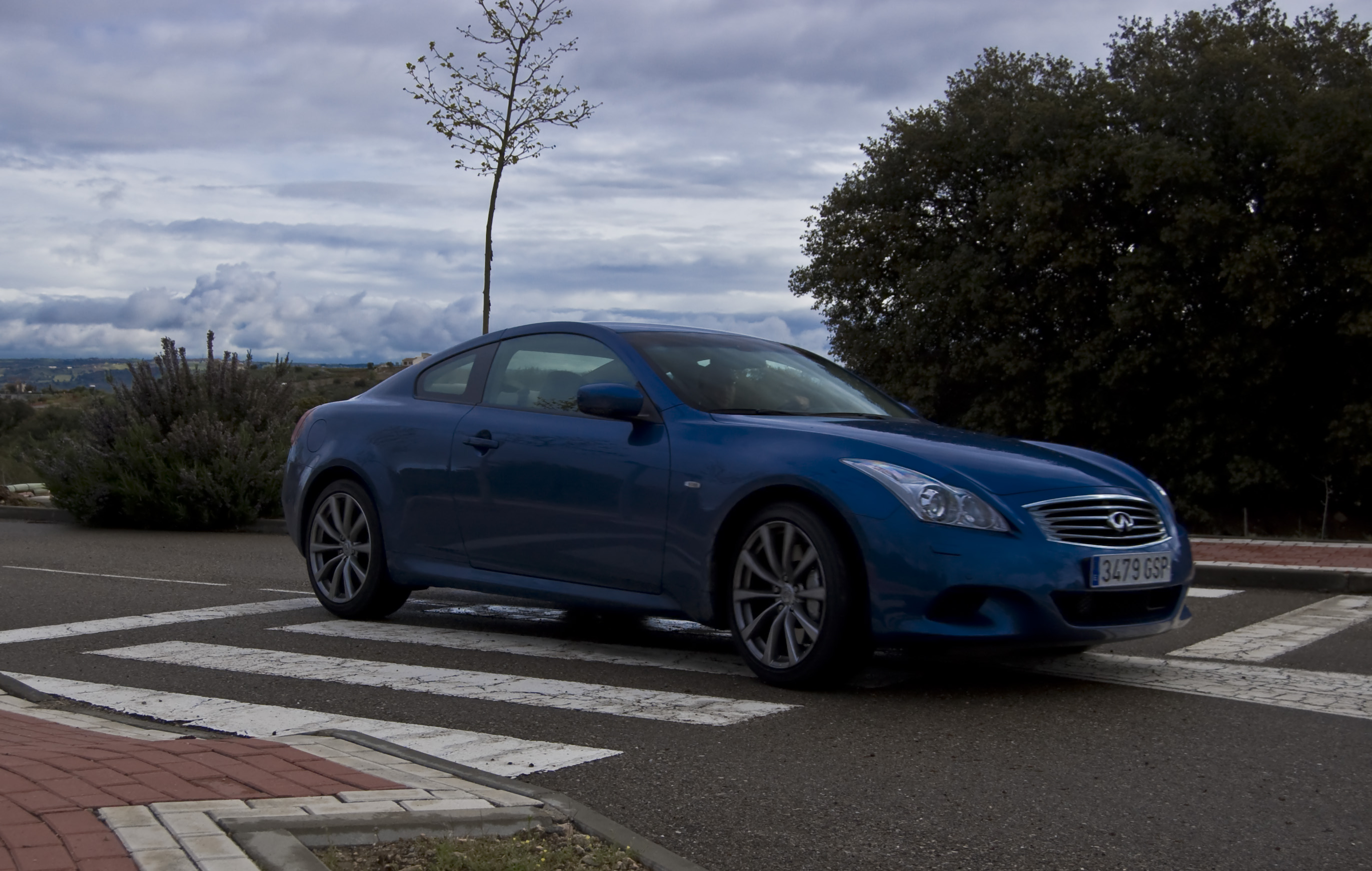 Prueba del Infiniti G37 Coupé S para